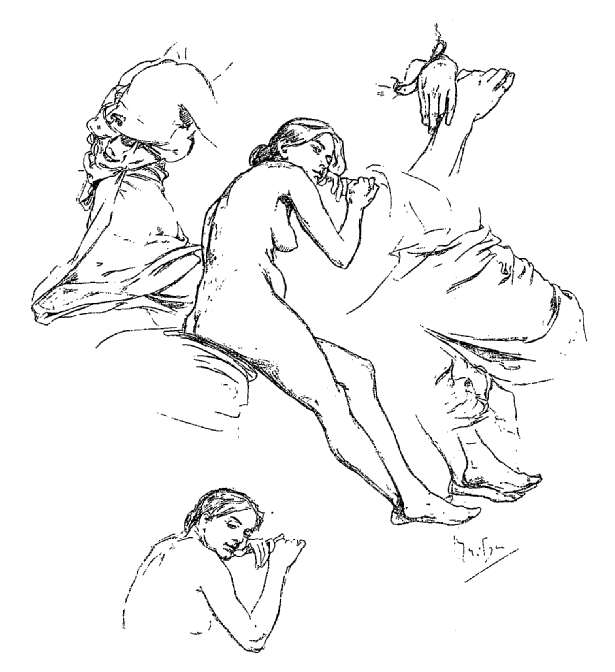 divers croquis : mains, femme nue assise, etc